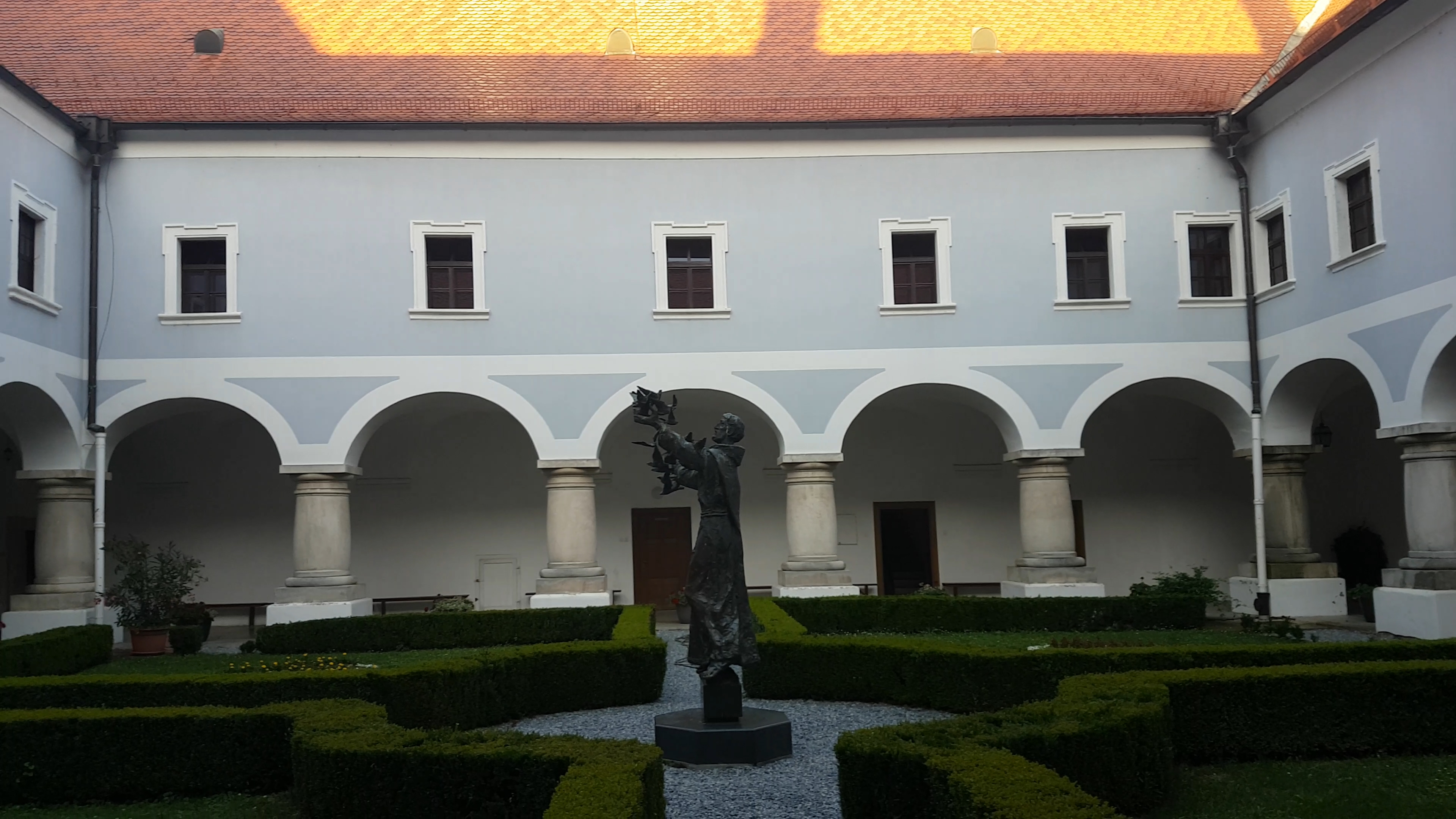 Dvorište Franjevačkog samostana